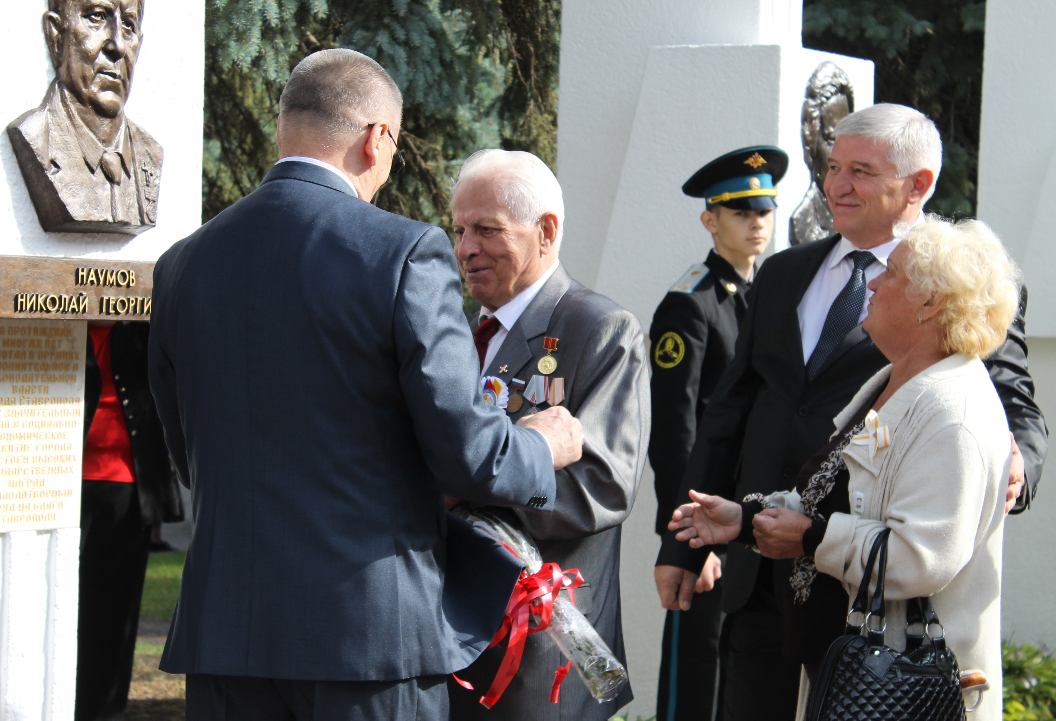 Открытие пилона Николая Наумова на аллее Почётных граждан города Ставрополя, 2013 год